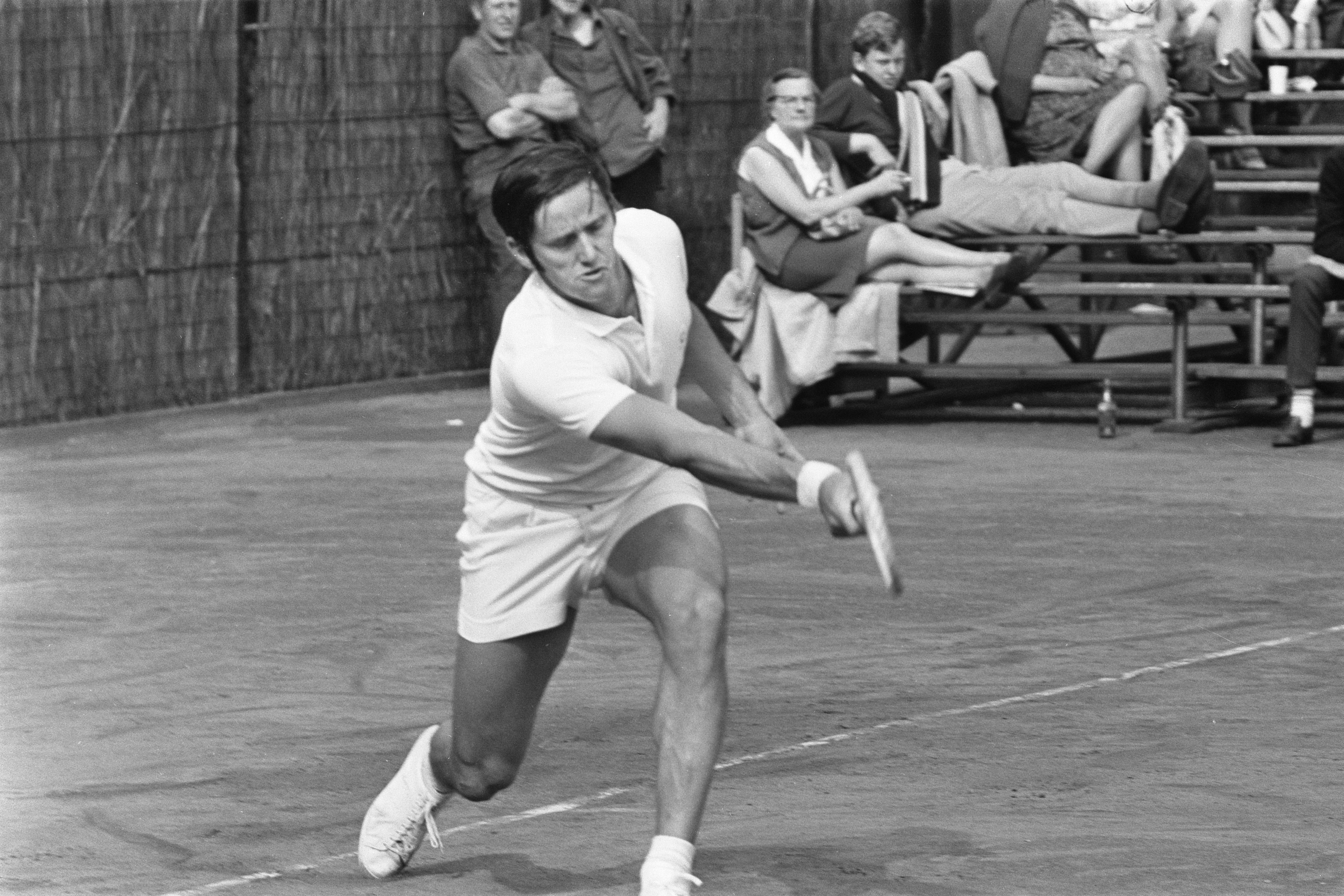 Collectie / Archief : Fotocollectie Anefo Reportage / Serie : [ onbekend ] Beschrijving : Tennis Amsterdam Roy Emerson in aktie Datum : 23 mei 1969 Locatie : Amsterdam, Noord-Holland Trefwoorden : TENNIS Persoonsnaam : Roy Emerson Fotograaf : Koch, Eric / Anefo Auteursrechthebbende : Nationaal Archief Materiaalsoort : Negatief (zwart/wit) Nummer archiefinventaris : bekijk toegang 2.24.01.05 Bestanddeelnummer : 922-4537 Reacties Geplaatst door Raymond op 14 juli 2013 - 17:13. Dit is niet Tony (sp.) Roche, maar zijn landgenoot Roy Emerson.